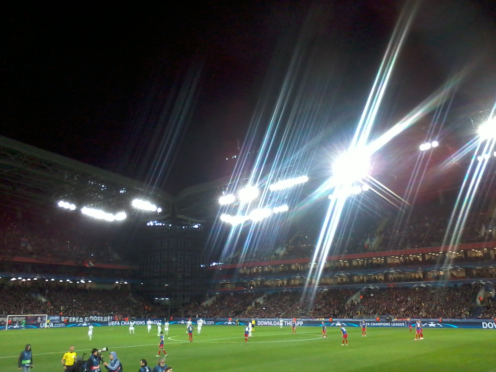 Стартовый свисток в матче ЦСКА - Манчестер Юнайтед второго тура группового раунда Лиги Чемпионов UEFA 2017/2018